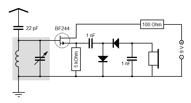 Verbesserter Einkreiser mit FET